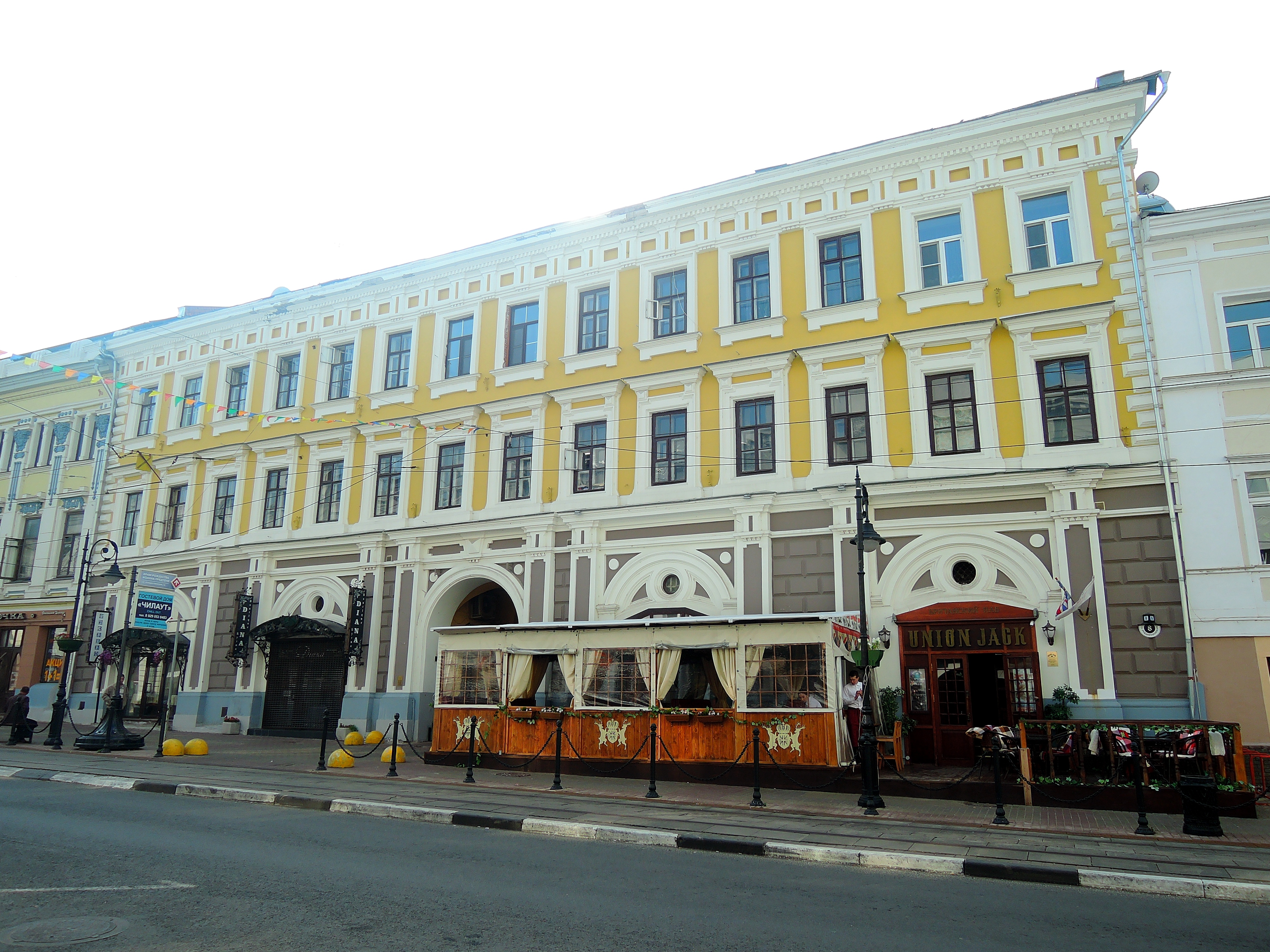 Доходный дом: улица Рождественская, 8, Нижний Новгород, Нижегородская область